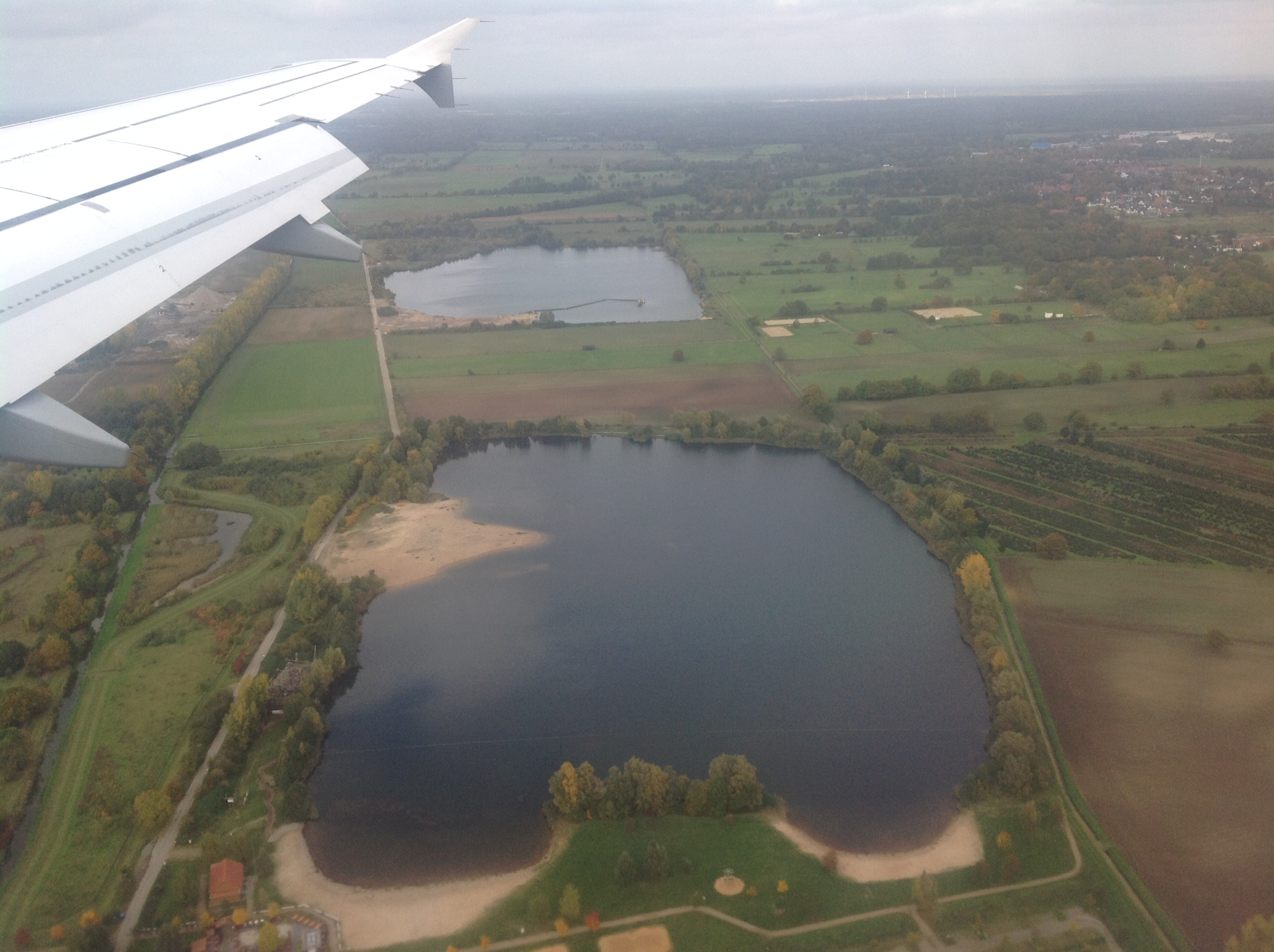 Seen bei Isernhagen bei Hannover